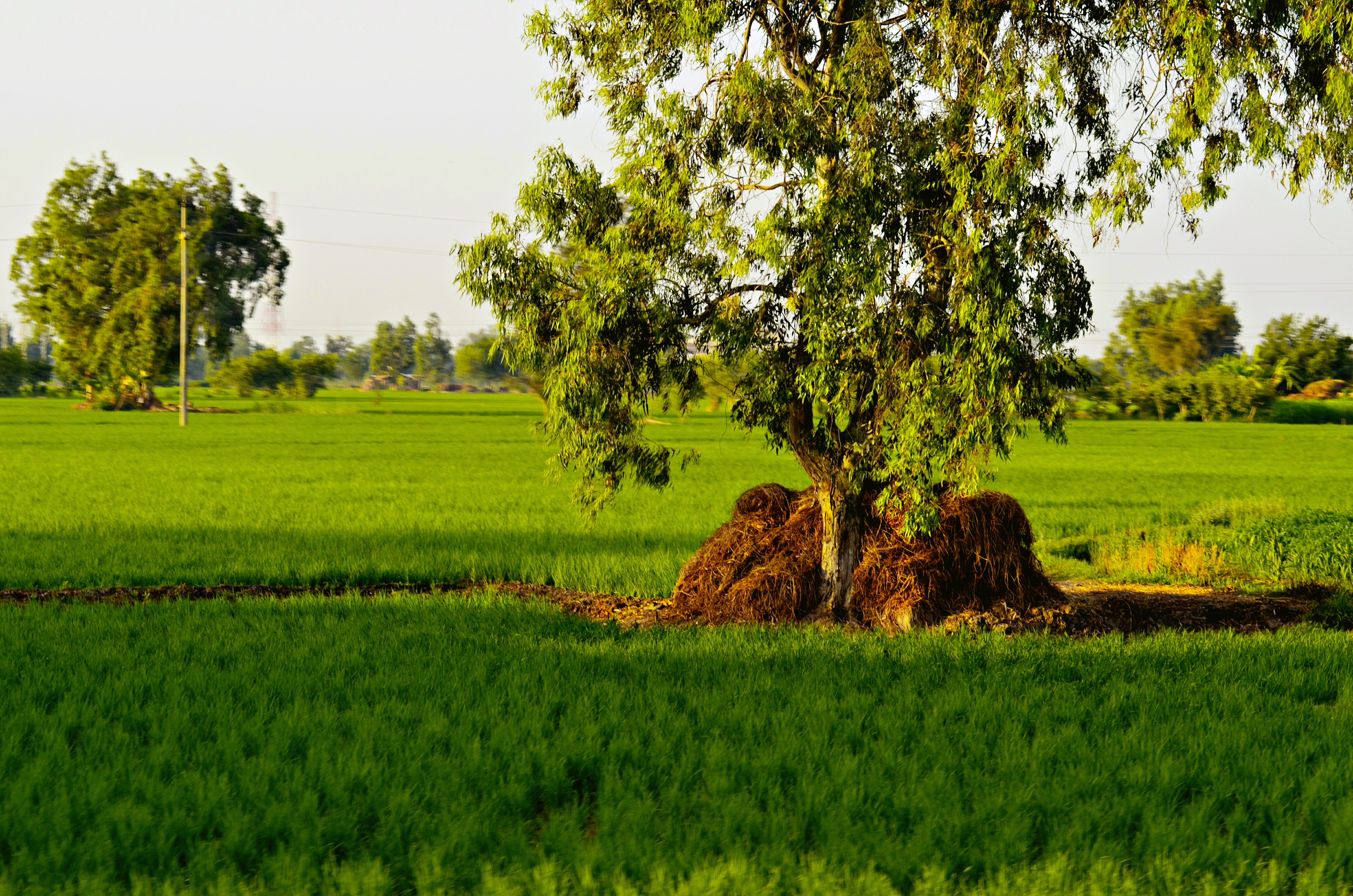 زمام قرية سنهور لمدينة، مركز دسوق، مصر